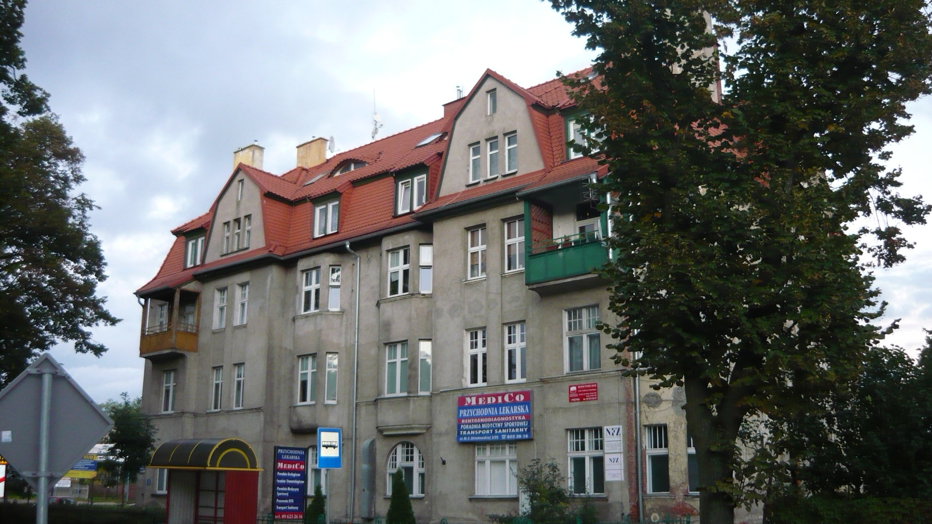 budynek mieszkalny - kamienica z przedogródkiem, zachowaną częścią ogrodzenia i działką Szczytno, ul. Curie-Skłodowskiej3, Szczytno (gmina miejska)